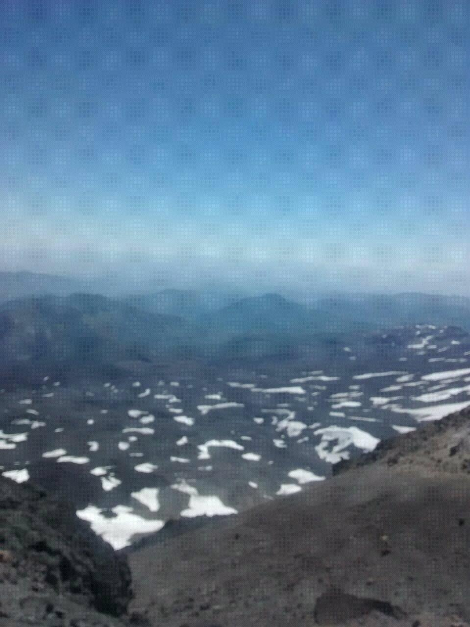 Vista desde la cima